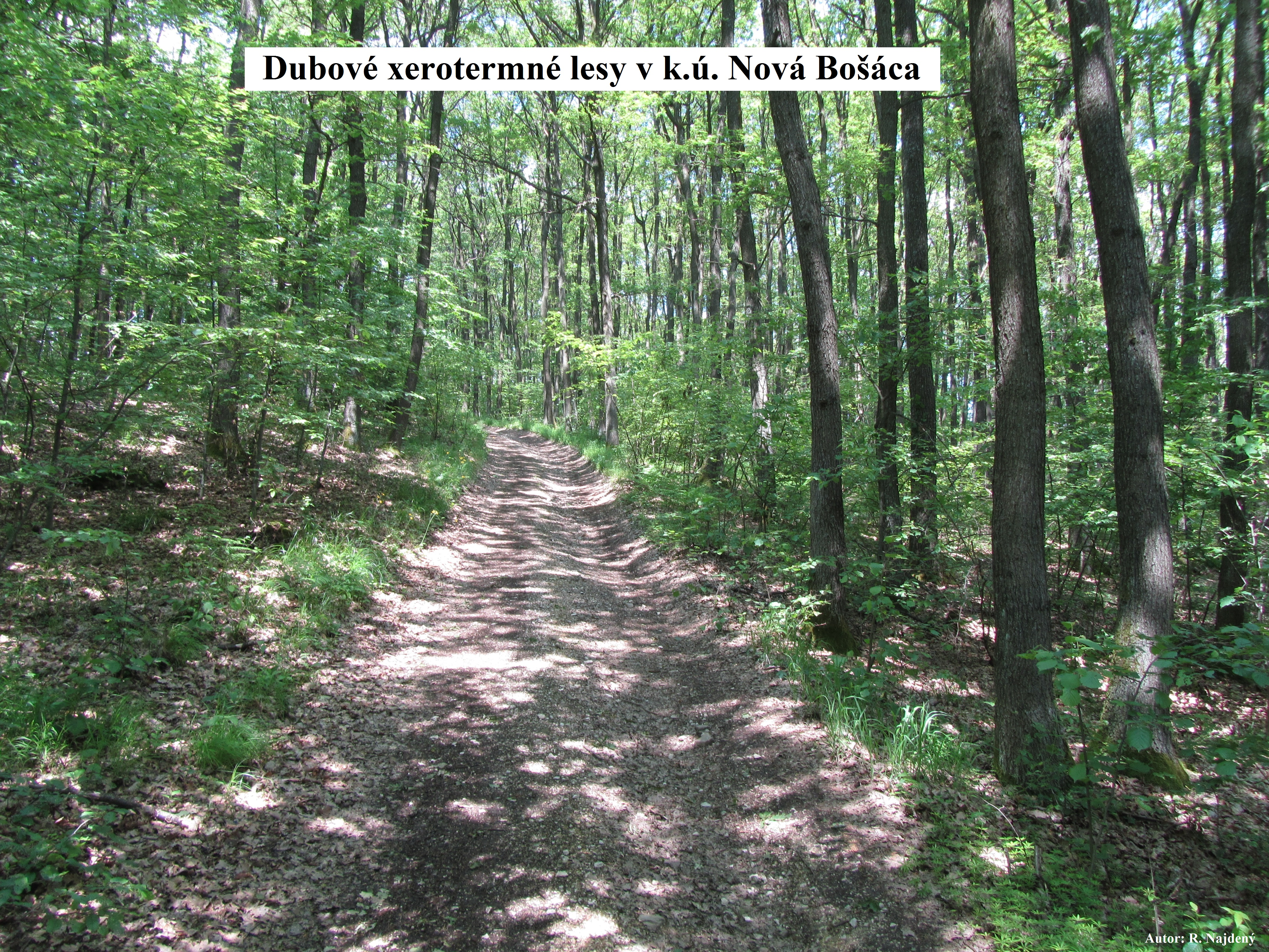 Dubove lesy Nová BOšáca